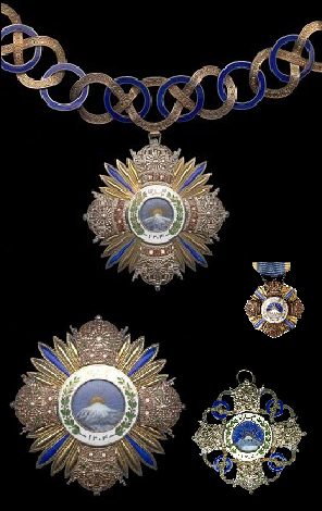 insignias Orden de Pahlavi